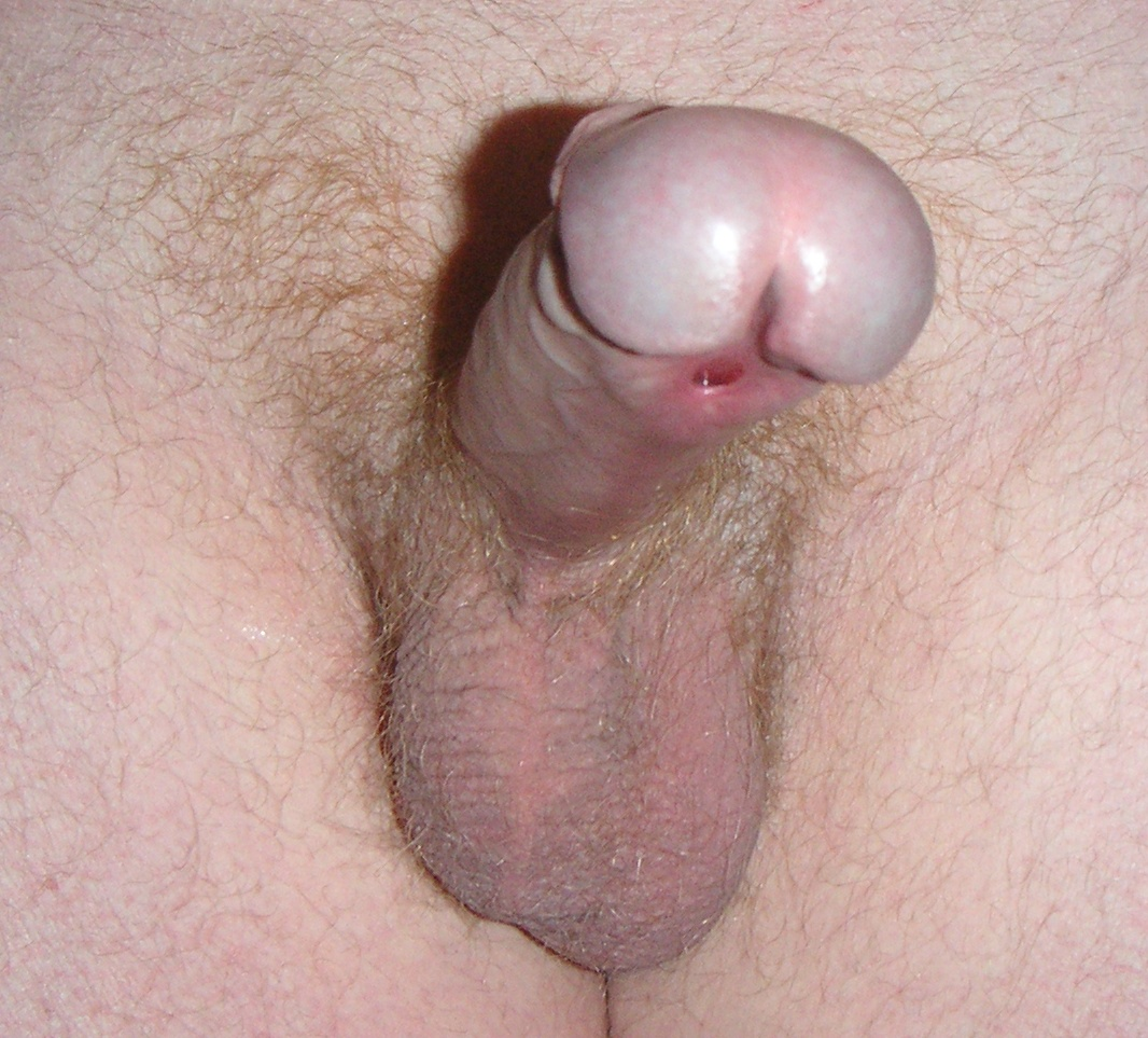 Hypospadie steifer Penis Frontansicht